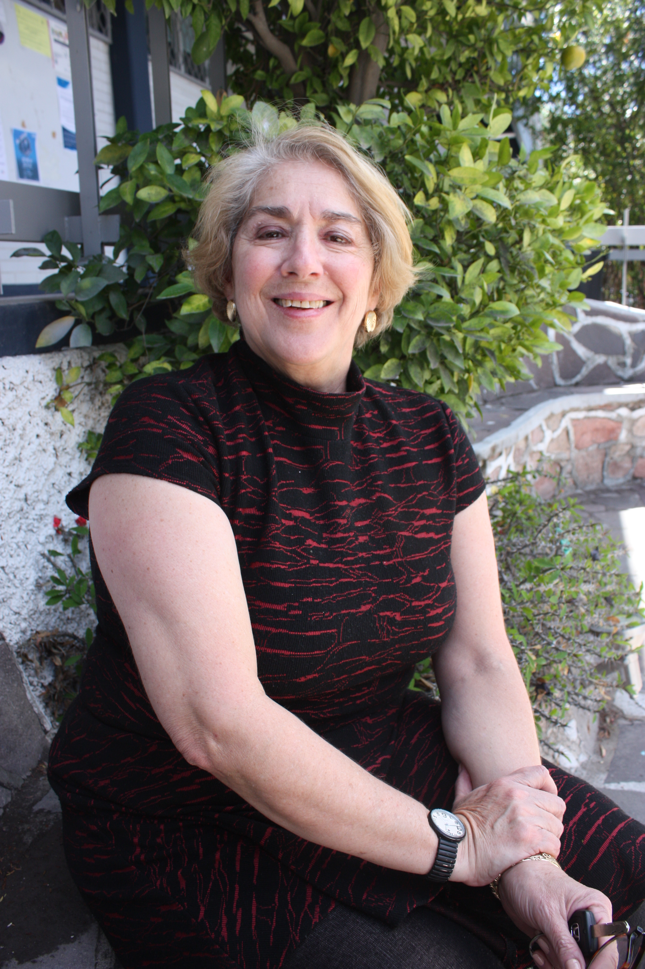 Profesora e investigadora de la Universidad Autónoma de Querétaro.